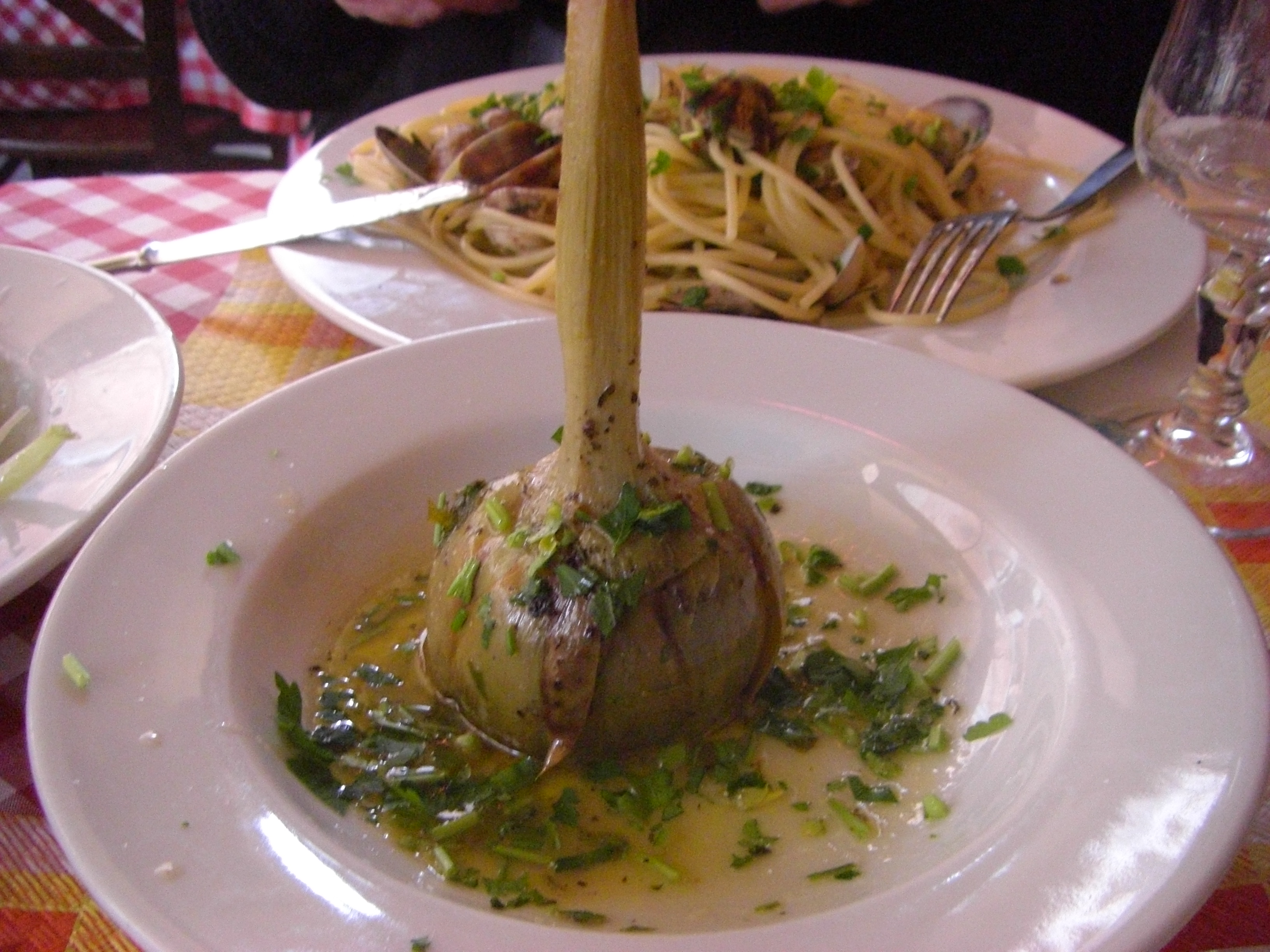 Carciofi alla Romana